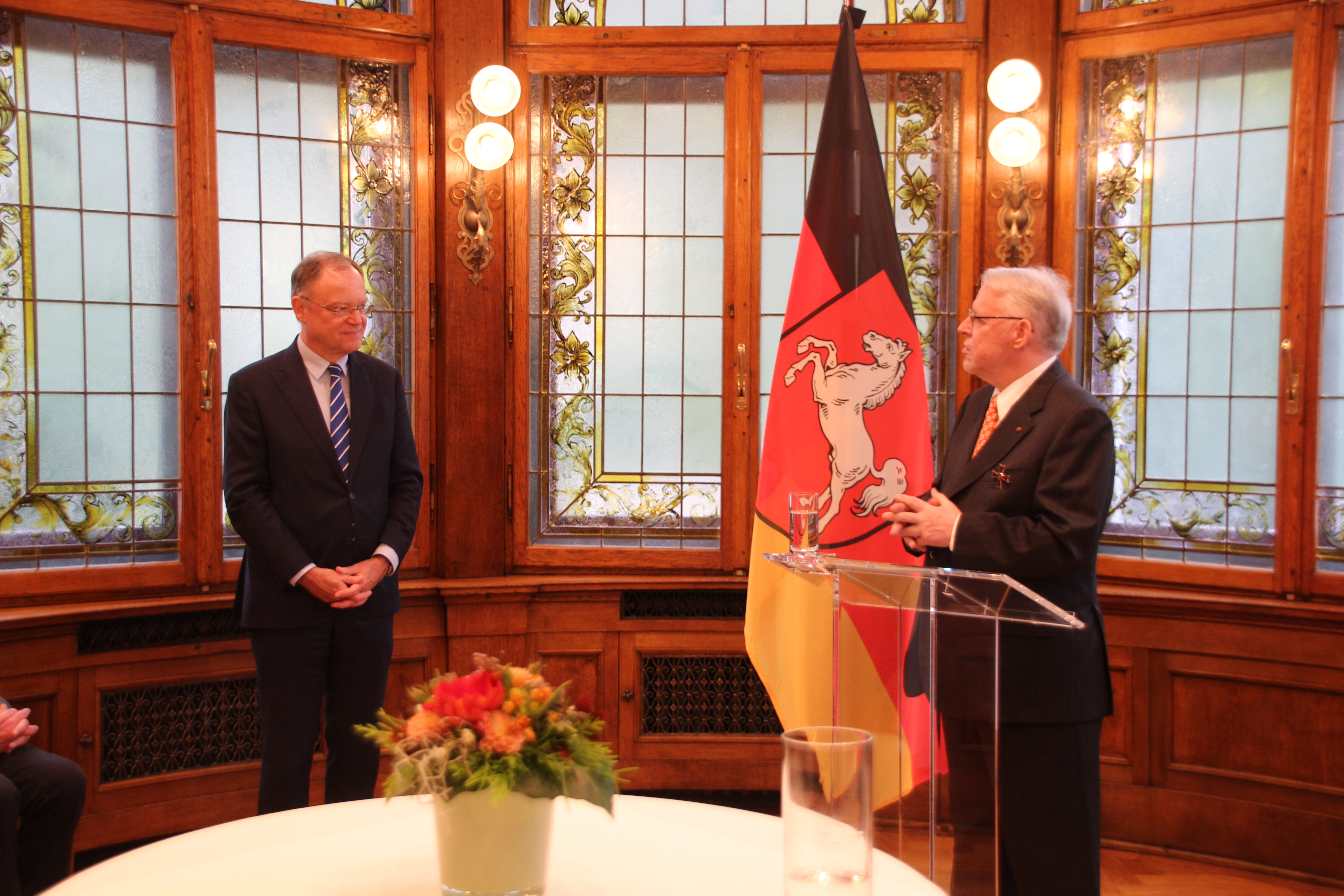 Der Niedersächsische Ministerpräsident, Stephan Weil, verlieh Klaus Wettig im Jahr 2017 das Verdienstkreuz 1. Klasse des Niedersächsischen Verdienstordens und händigte es ihm im Gästehaus der Niedersächsischen Landesregierung am 25. Oktober 2017 aus. Das Foto zeigt Klaus Wettig (rechts) bei seiner Dankesrede. Links Ministerpräsident Stephan Weil.